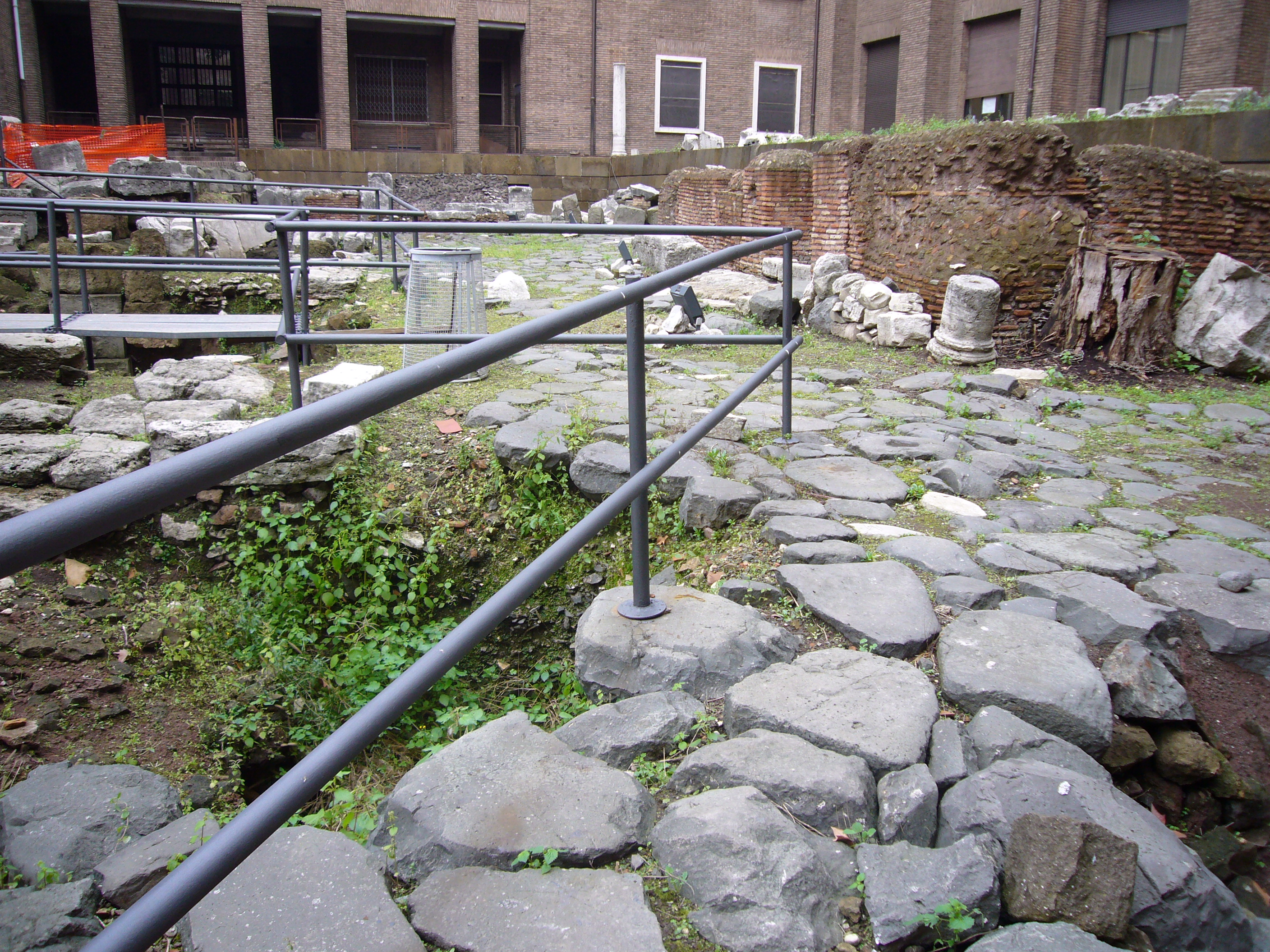 Roma, area sacra di Sant'Omobono. Basolato